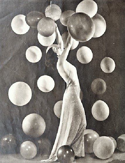 Conchita Montenegro